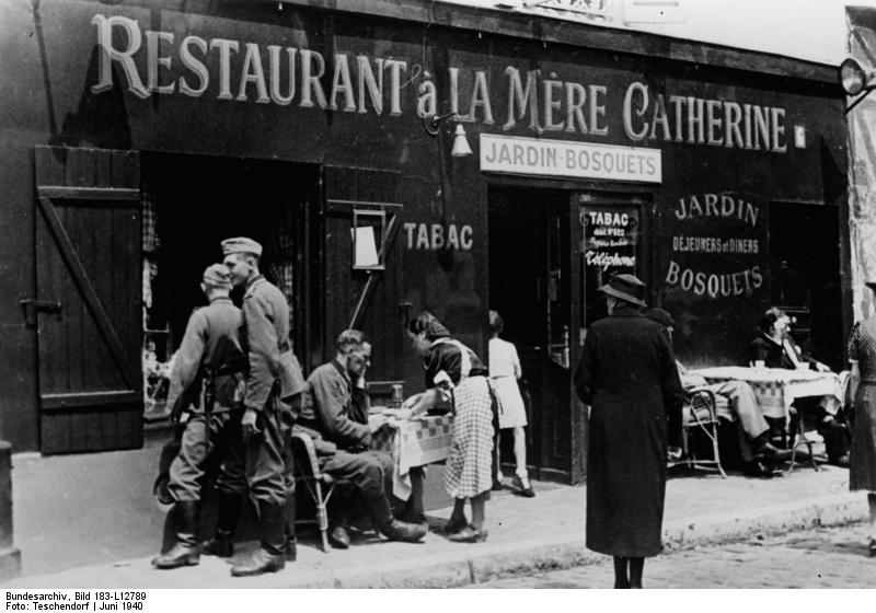 Paris, deutsche Soldaten vor einem Restaurant Scherl: Pariser Strassenbild, PK - Teschendorff; Juni 1940 ADN-ZB/Archiv: II.Weltkrieg 1939-45 Frankreich während der faschistischen deutschen Besetzung; Ende Juni 1940. Deutsche Soldaten sind Gäste eines kleinen Restaurants in Paris. Die französische Hauptstadt wird am 14.6. von faschistischen deutschen Truppen besetzt. Aufnahme Teschendorff 8020-46 Information added by Wikimedia users. Restaurant à la Mère Cathérine, 6 place du Tertre, 75018 Paris